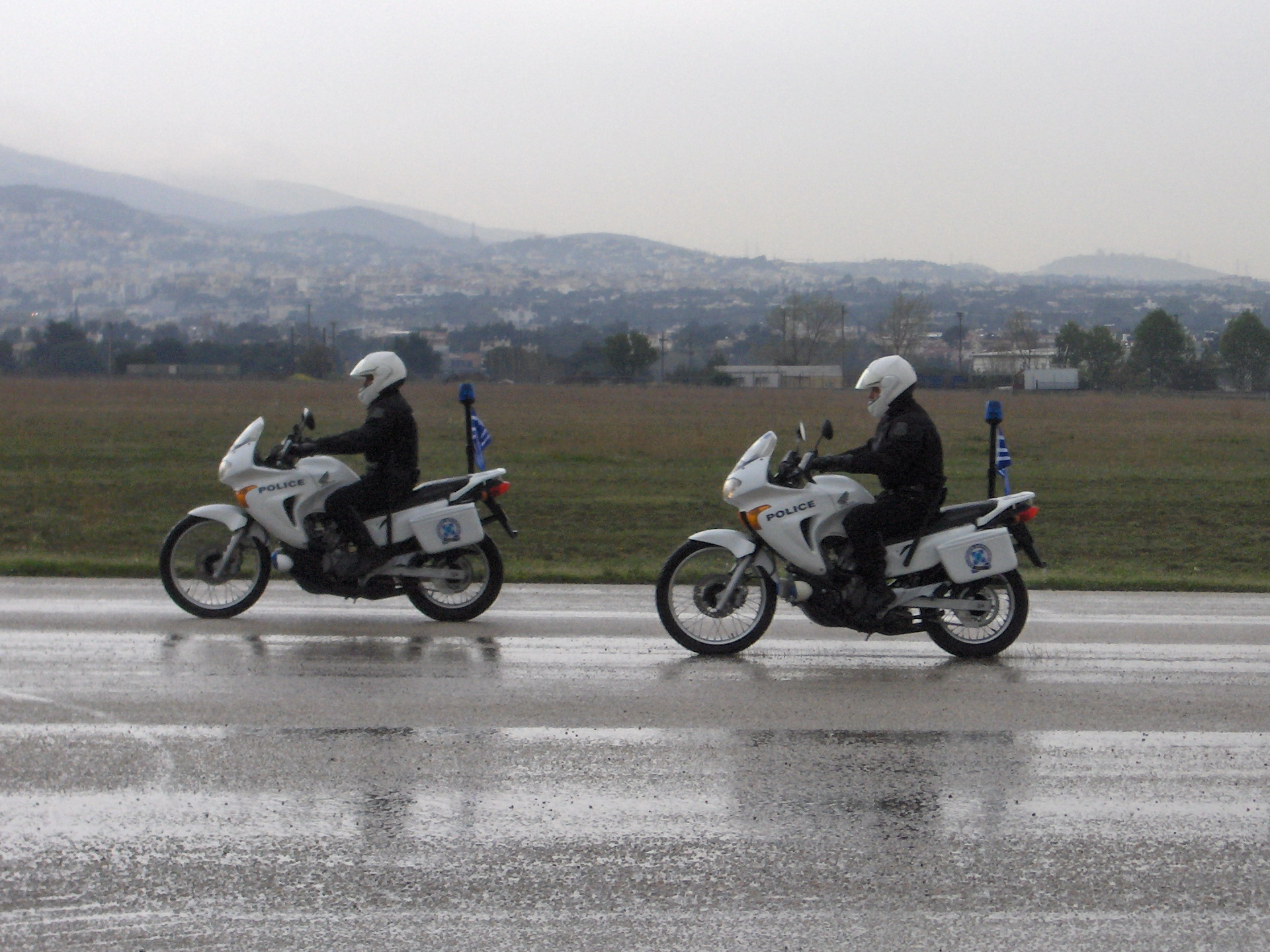 Honda Transalp 650, Greek police bikes